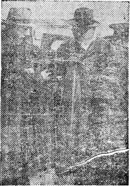 1948년 3월 13일, 장덕수 암살사건 재판관련 김구 출두 장면